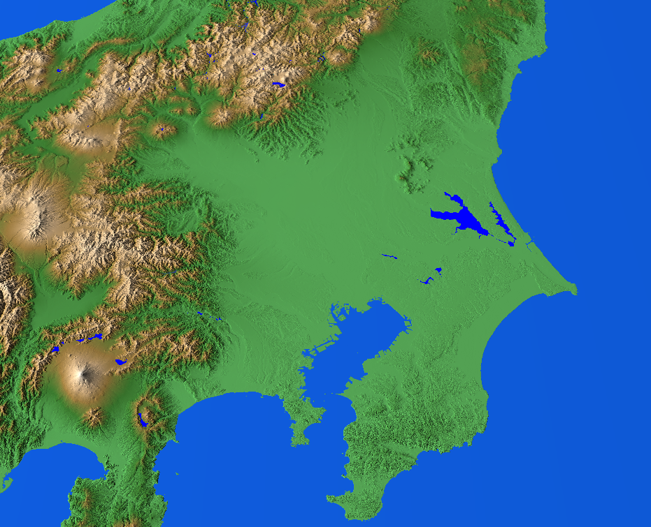 関東平野のCG画像。カシミール3Dを使用し作成。編集。